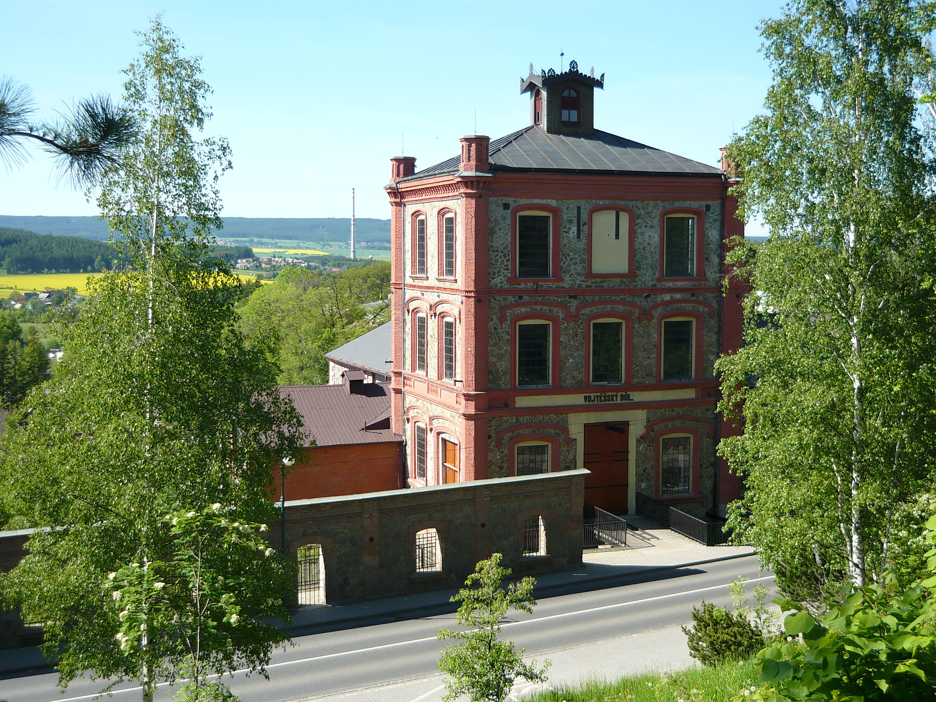 Pohled na Vojtěšský důl na Březových Horách v Příbrami